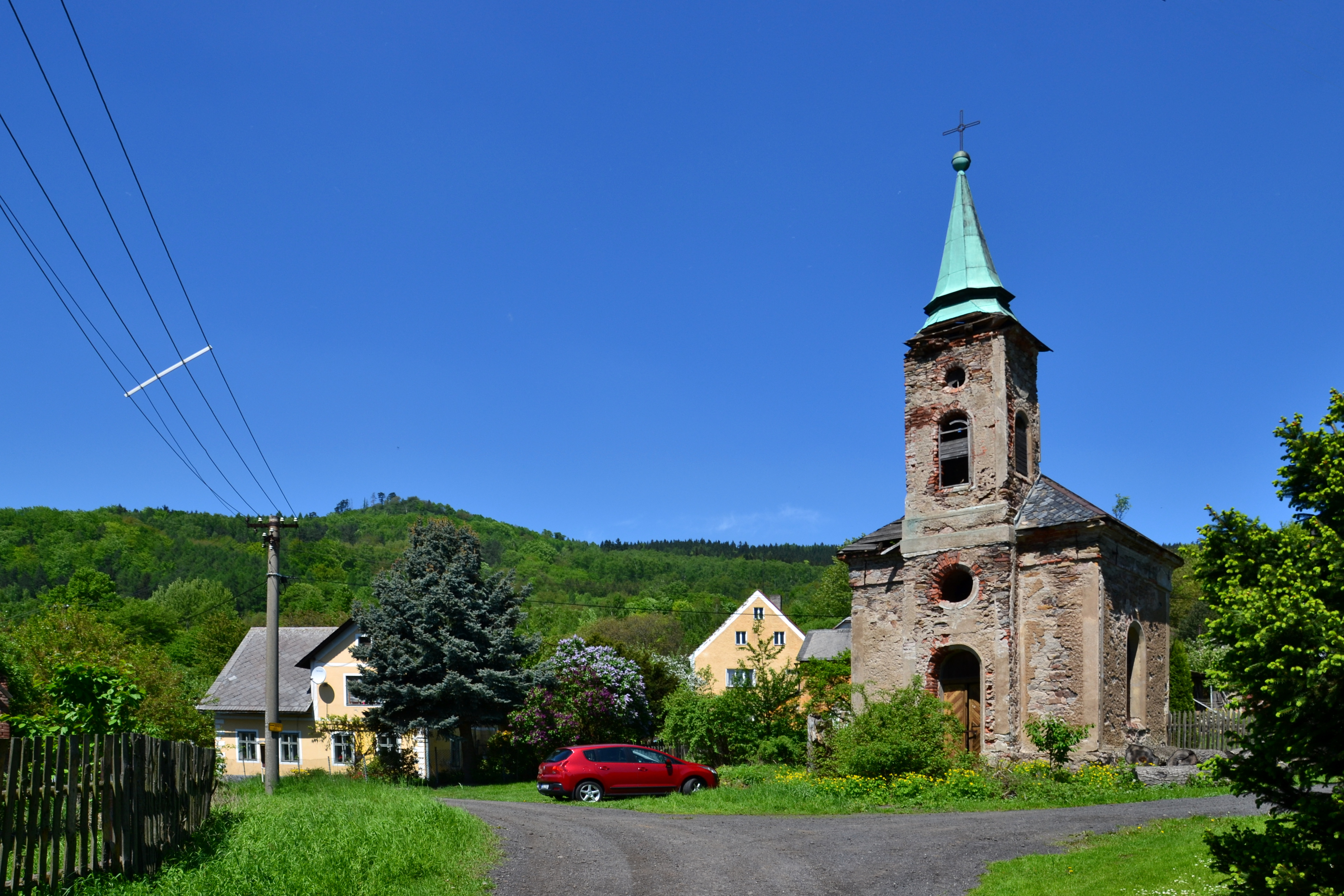 Smilov - kaple